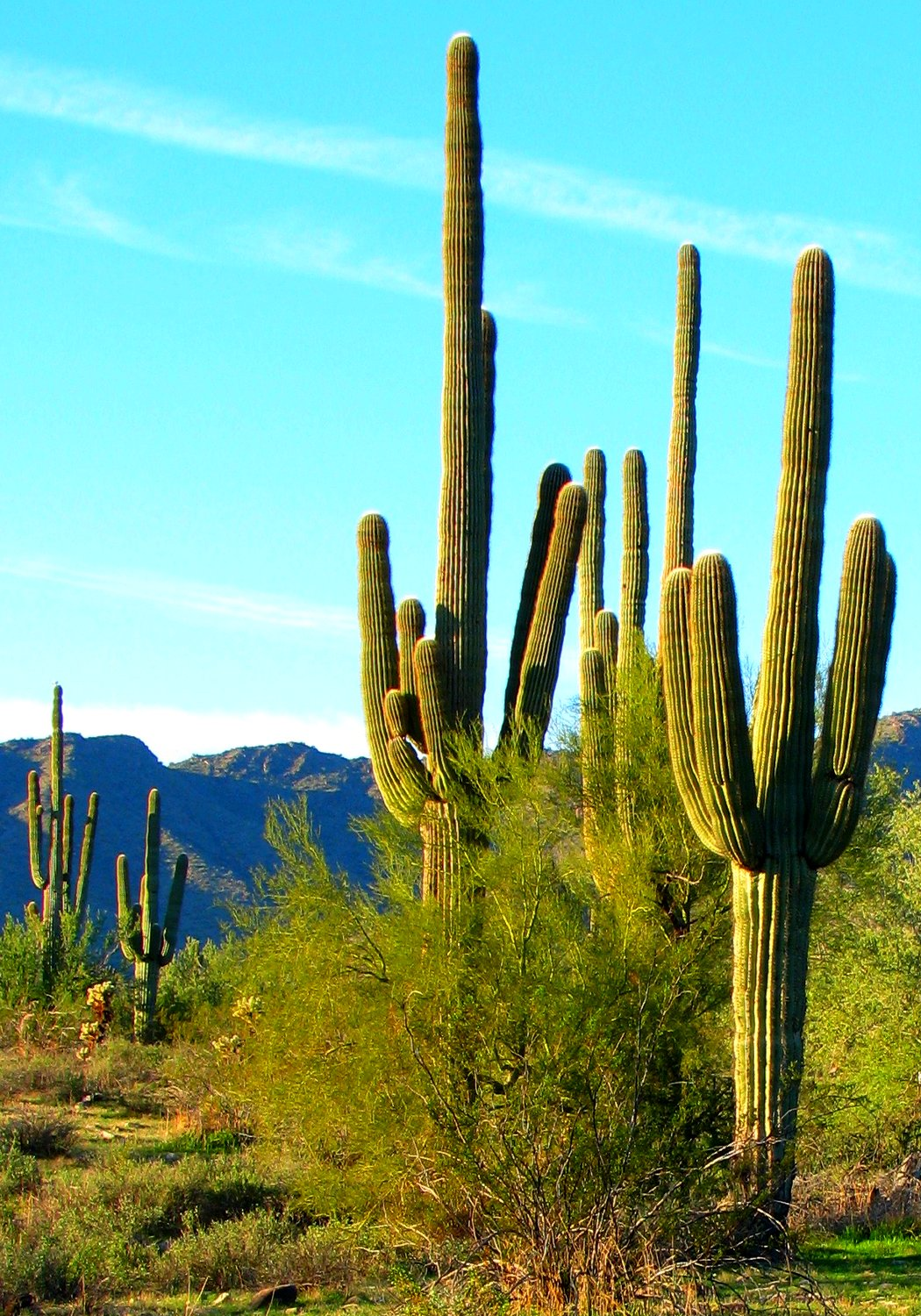 Saguaro Cactus